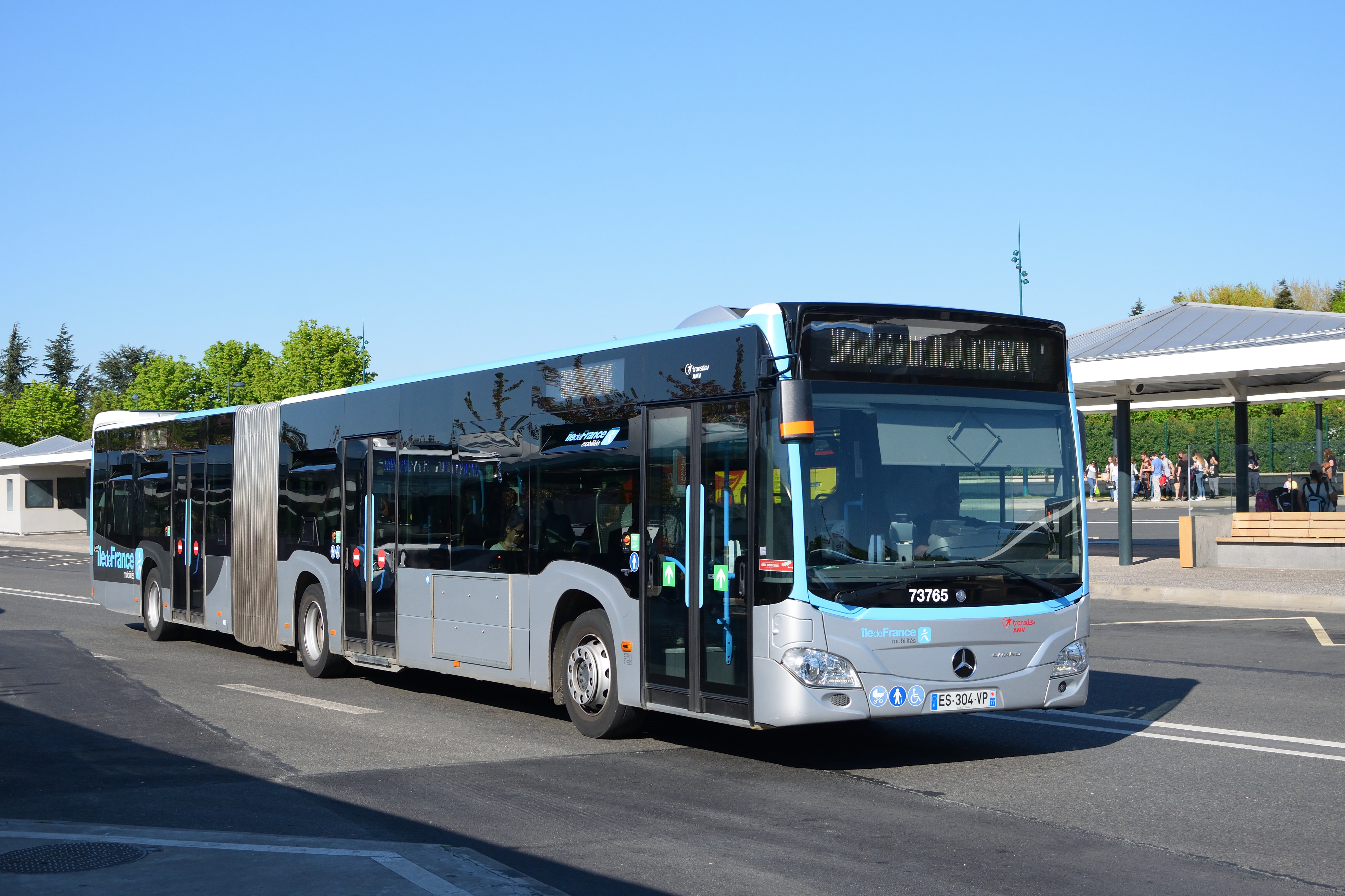 Mercedes-Benz Citaro G C2 Transdev AMV n°73765 sur la ligne 34 à Marne-la-Vallée Chessy RER.